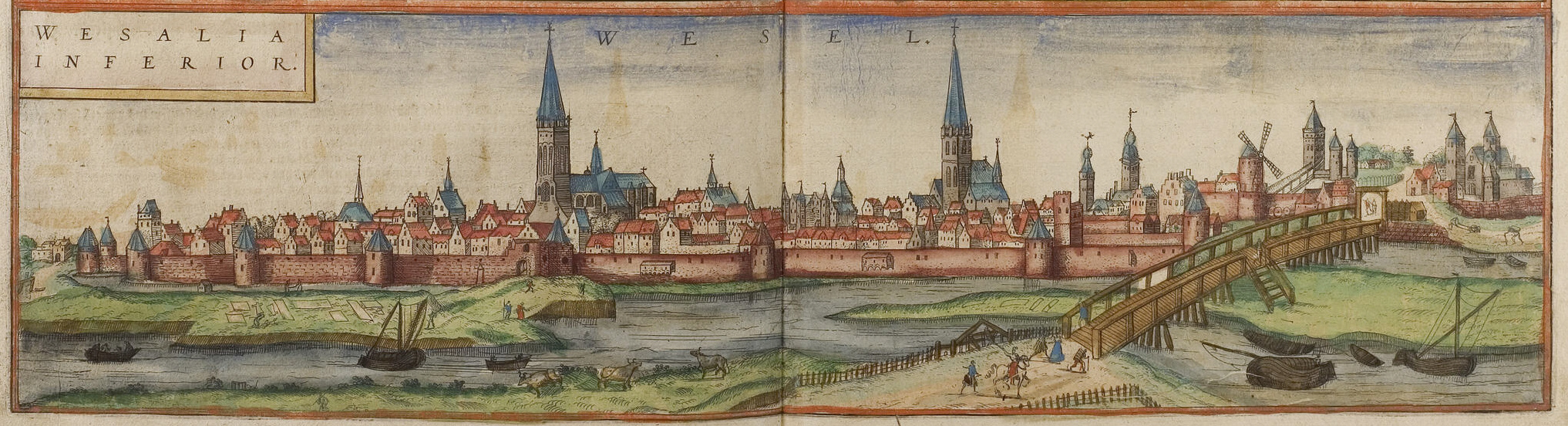 Wesel